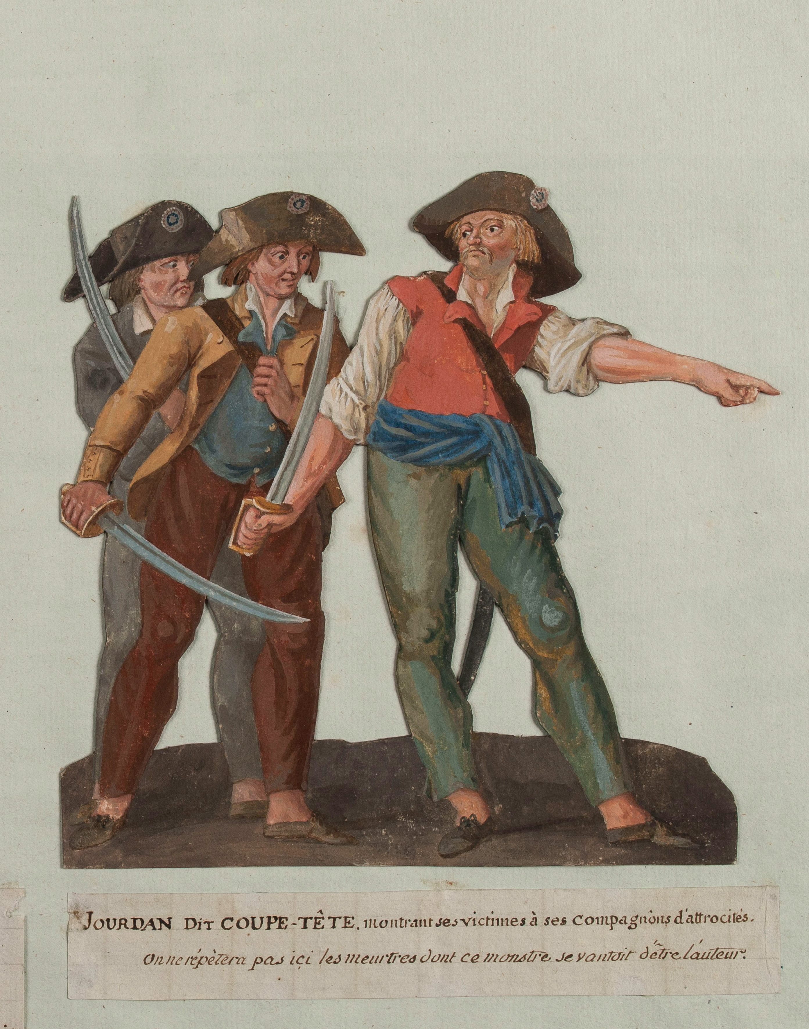 Mathieu Jouve Jourdan, dit Coupe-Tête. Gouache de Jean-Baptiste Lesueur, Paris, musée Carnavalet, vers 1793-1794.